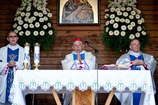 Prymas Polski Józef Glemp sprawuje Eucharystię podczas uroczystości ku czci Prymasa Księstwa Polskiego ks.kard. Aleksandra Kakowskiego w Świętym Miejscu